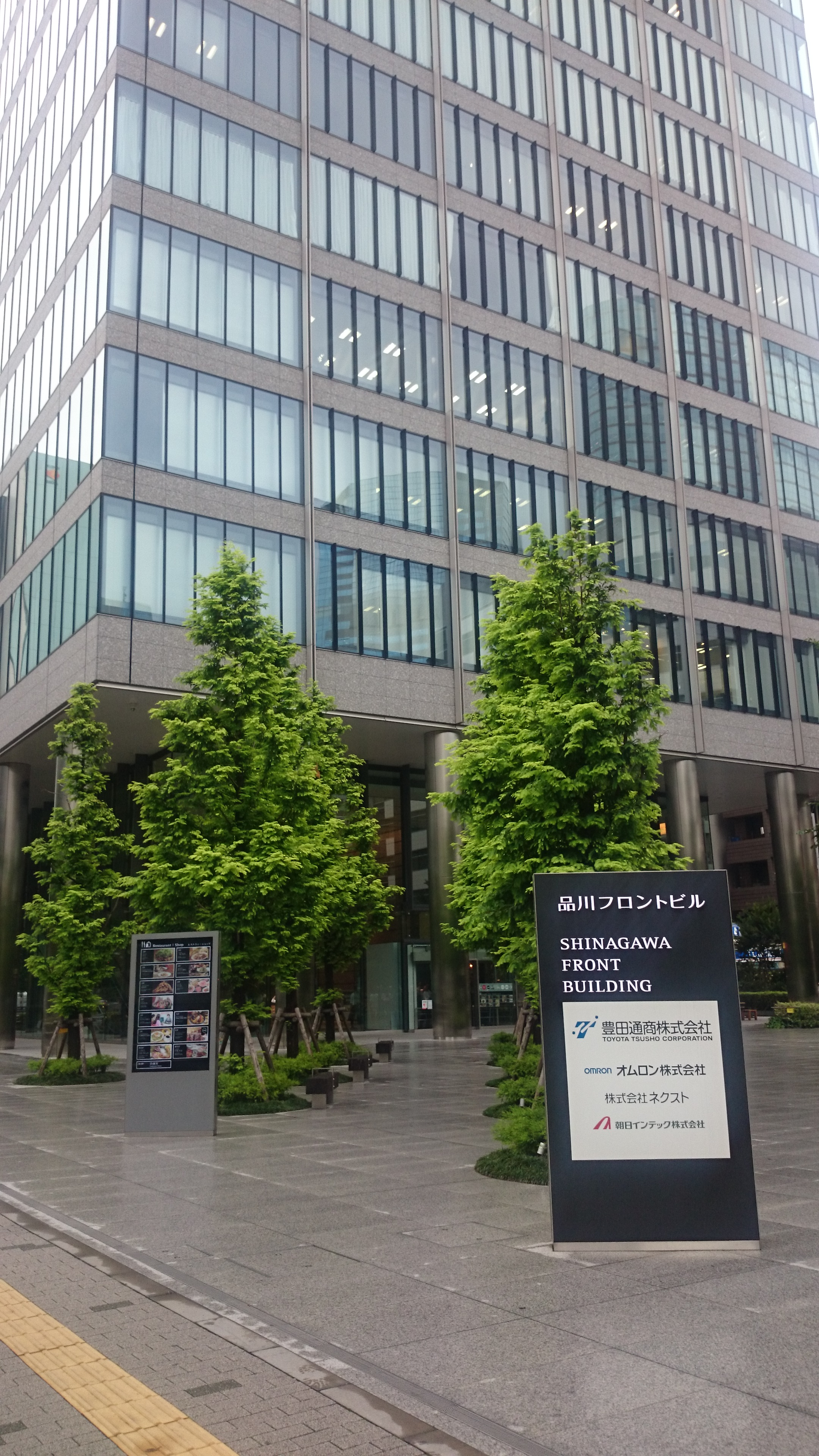 品川フロントビルには豊田通商株式会社の東京本社、並びに豊通グループの本支店が入居している。